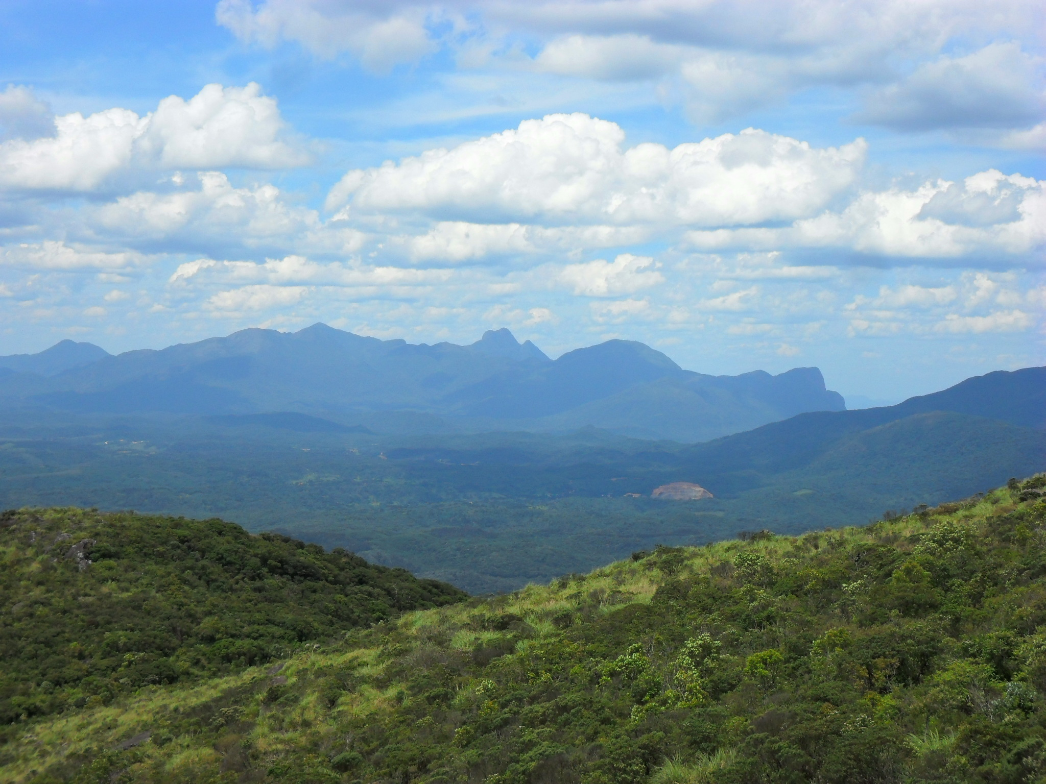 Vista da serra do Ibitiraquire desde o Anhangava